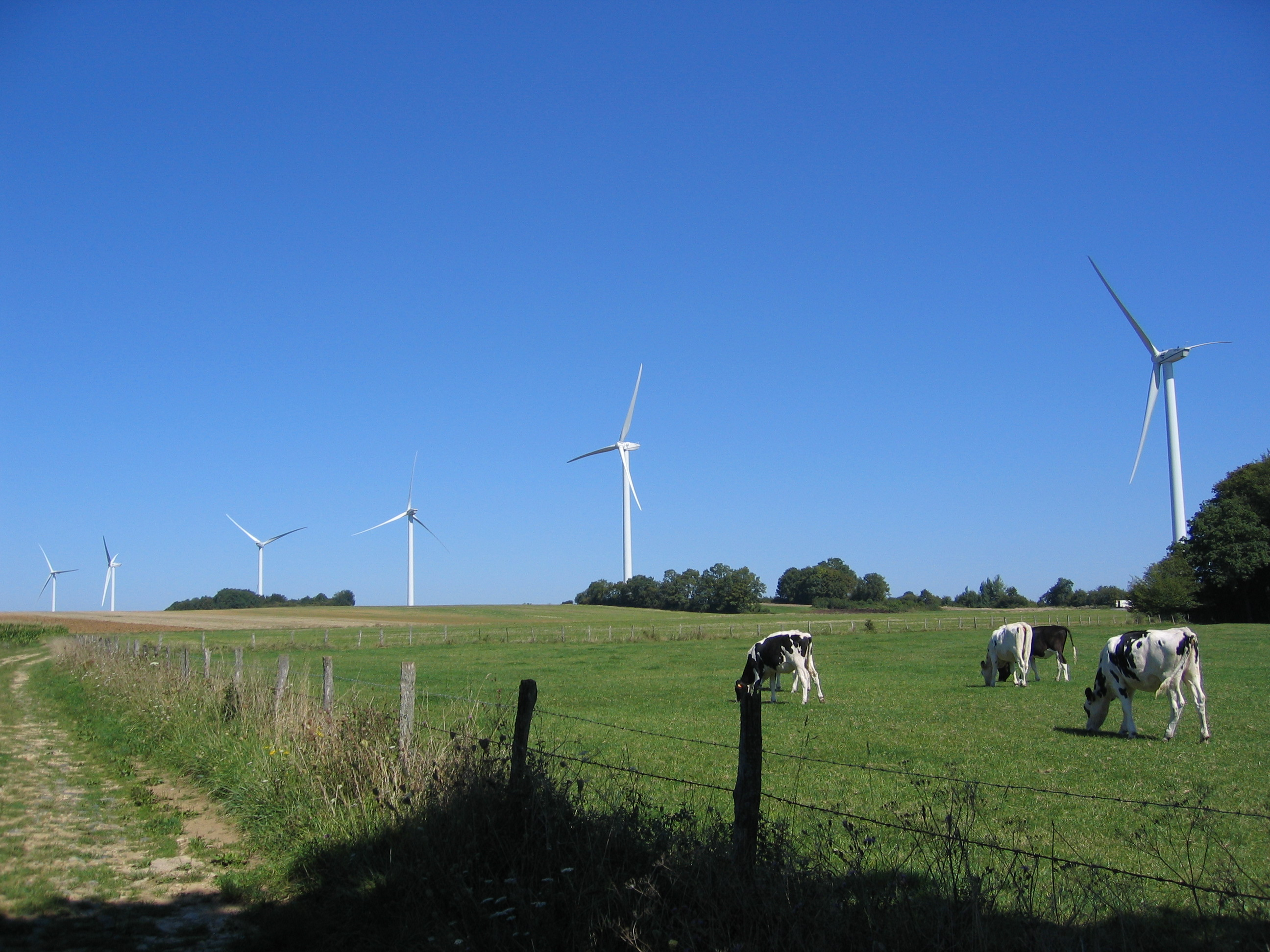 Eoliennes à Repaix (Lorraine)